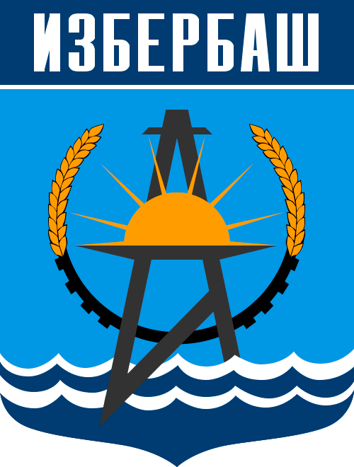 Герб города Избербаш